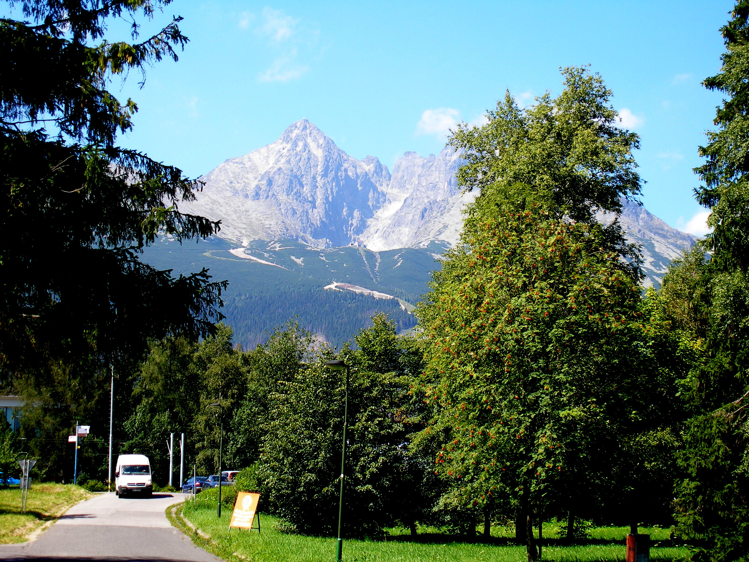 Osada Tatranská Lomnica. Mesto Vysoké Tatry.